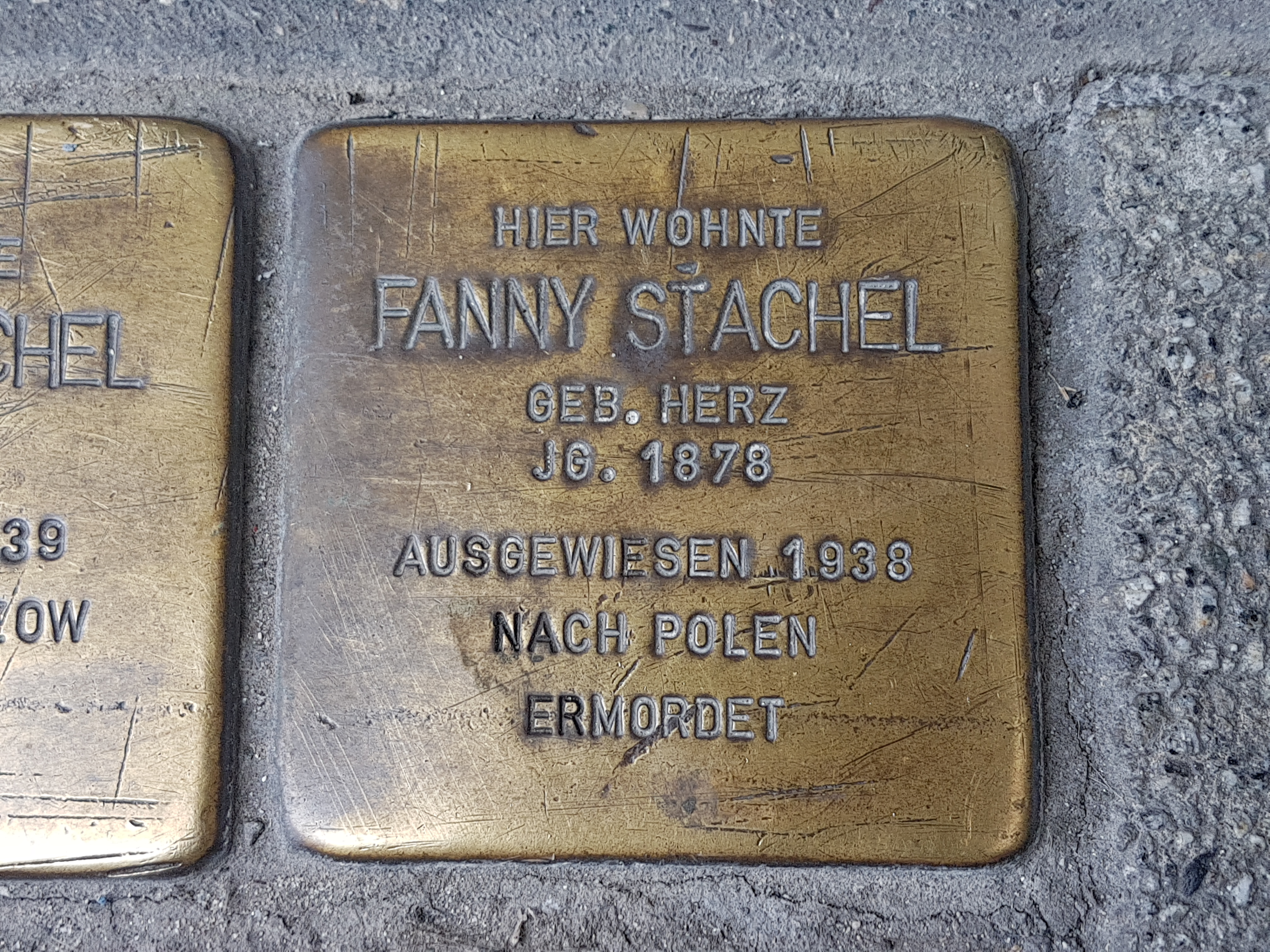 Fanny Stachel Stolperstein Duisburg